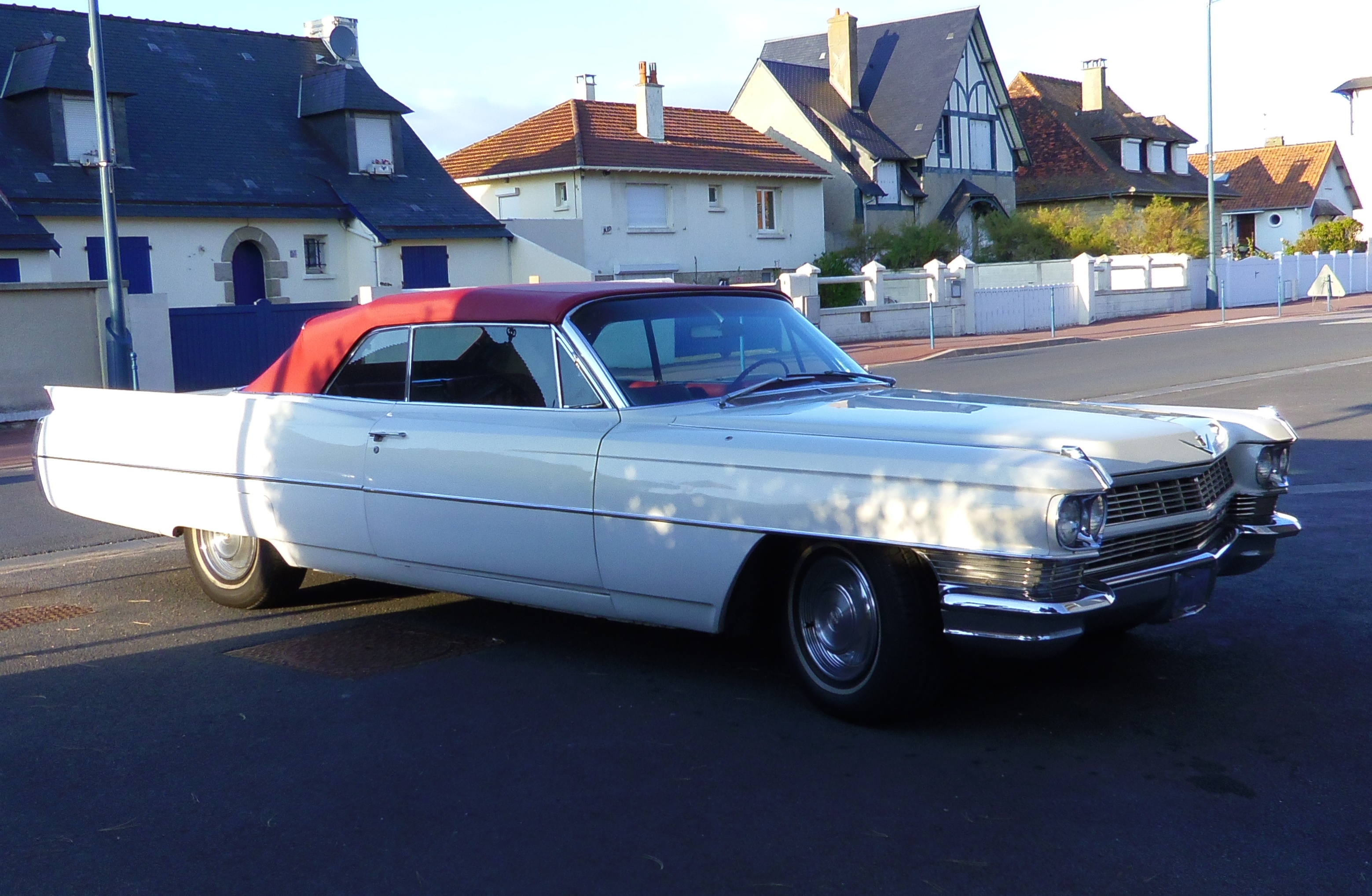 Cadillac modèle DeVille cabriolet de 1964 -2 places - vue 3/4 avant droit ( photo prise à 14-Villers-sur-Mer)